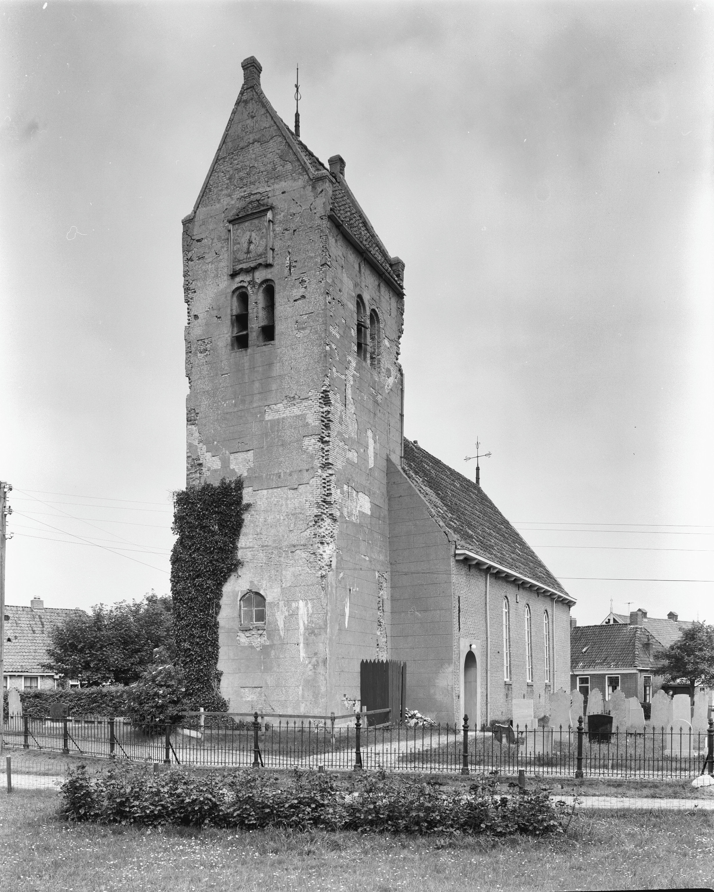 Nederlands Hervormde Kerk: toren naar het noord-oosten